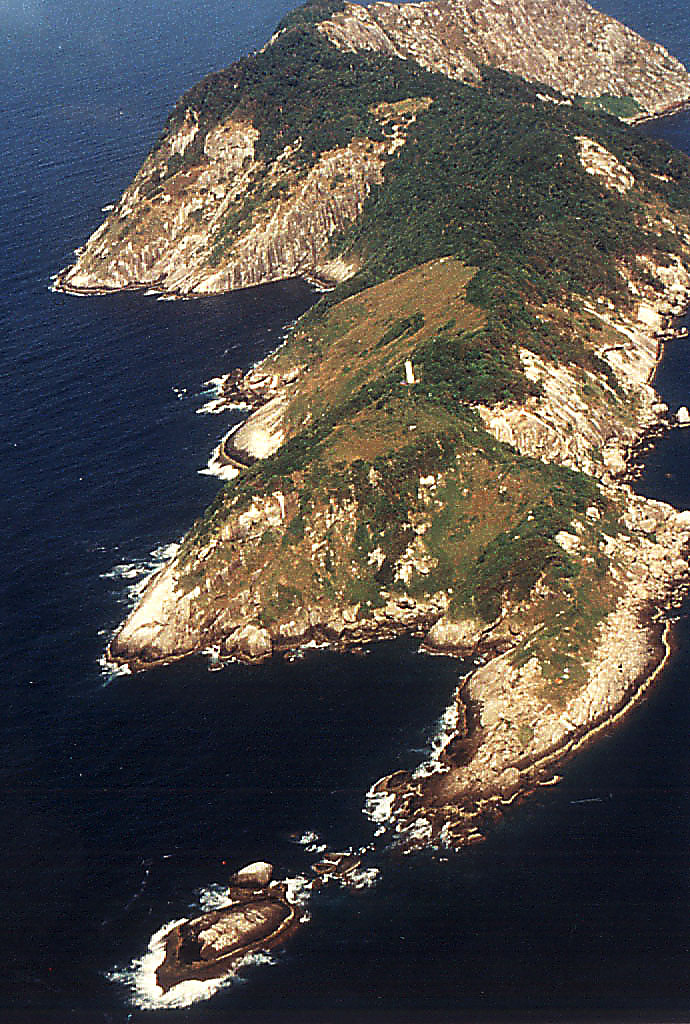 Ilha da Queimada Grande - Itanhaém3